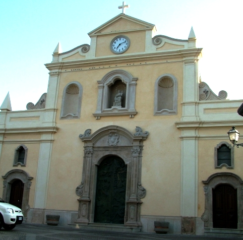 Chiesa che custodisce "Il Battesimo di Gesù sul fiume Giordano" l'unico affresco esistente attribuito al grande Maestro dell'impressionismo Pierre Auguste Renoir